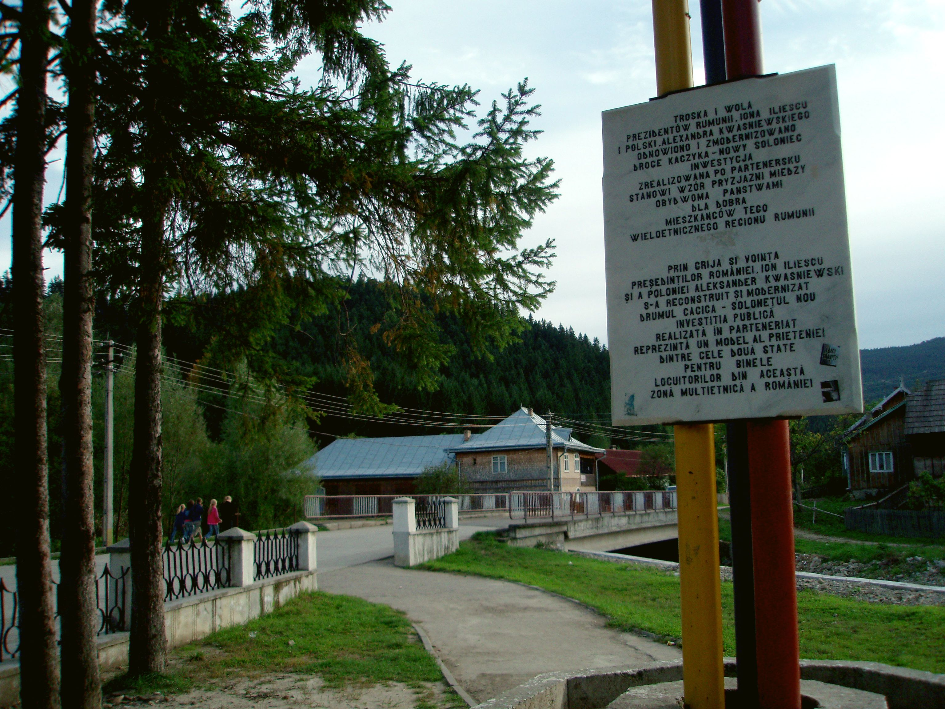 Nowy Soloniec (Solonetu Nou) tablica pamiątkowa, w głębi Dom Polski